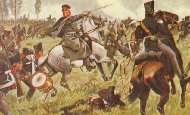 York in Wartenburg